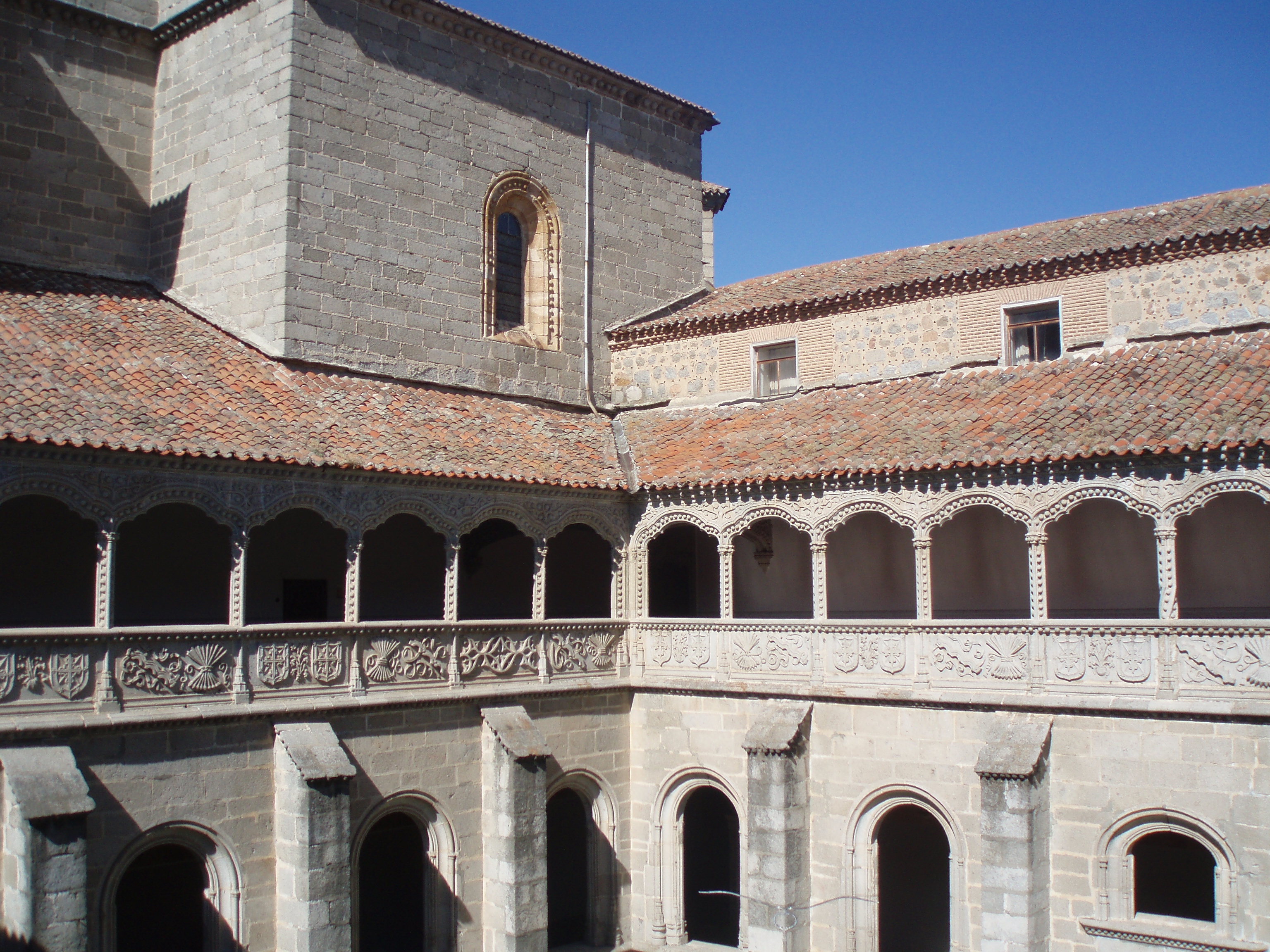 Claustro del Silencio